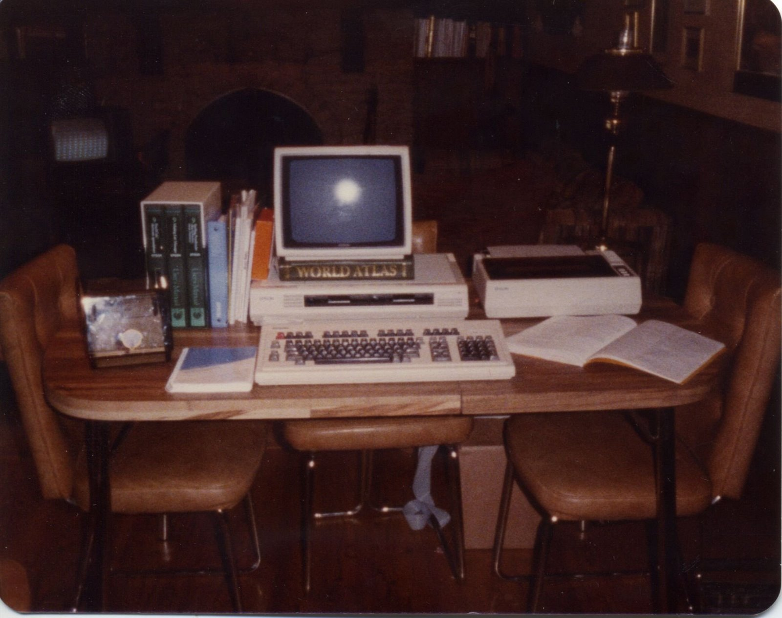 Epson QX-10